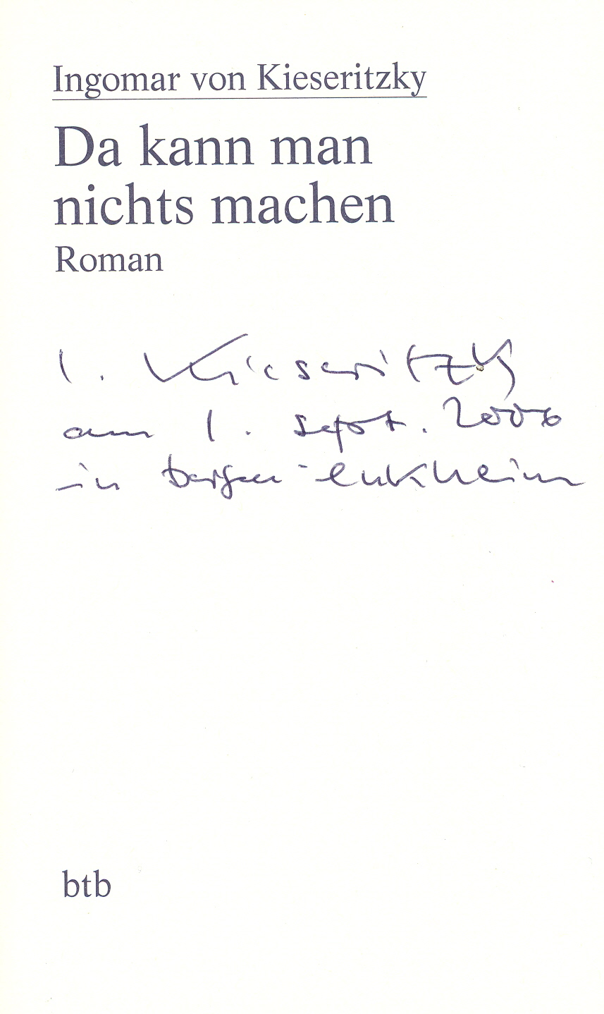 Autogramm von Ingomar von Kieseritzky